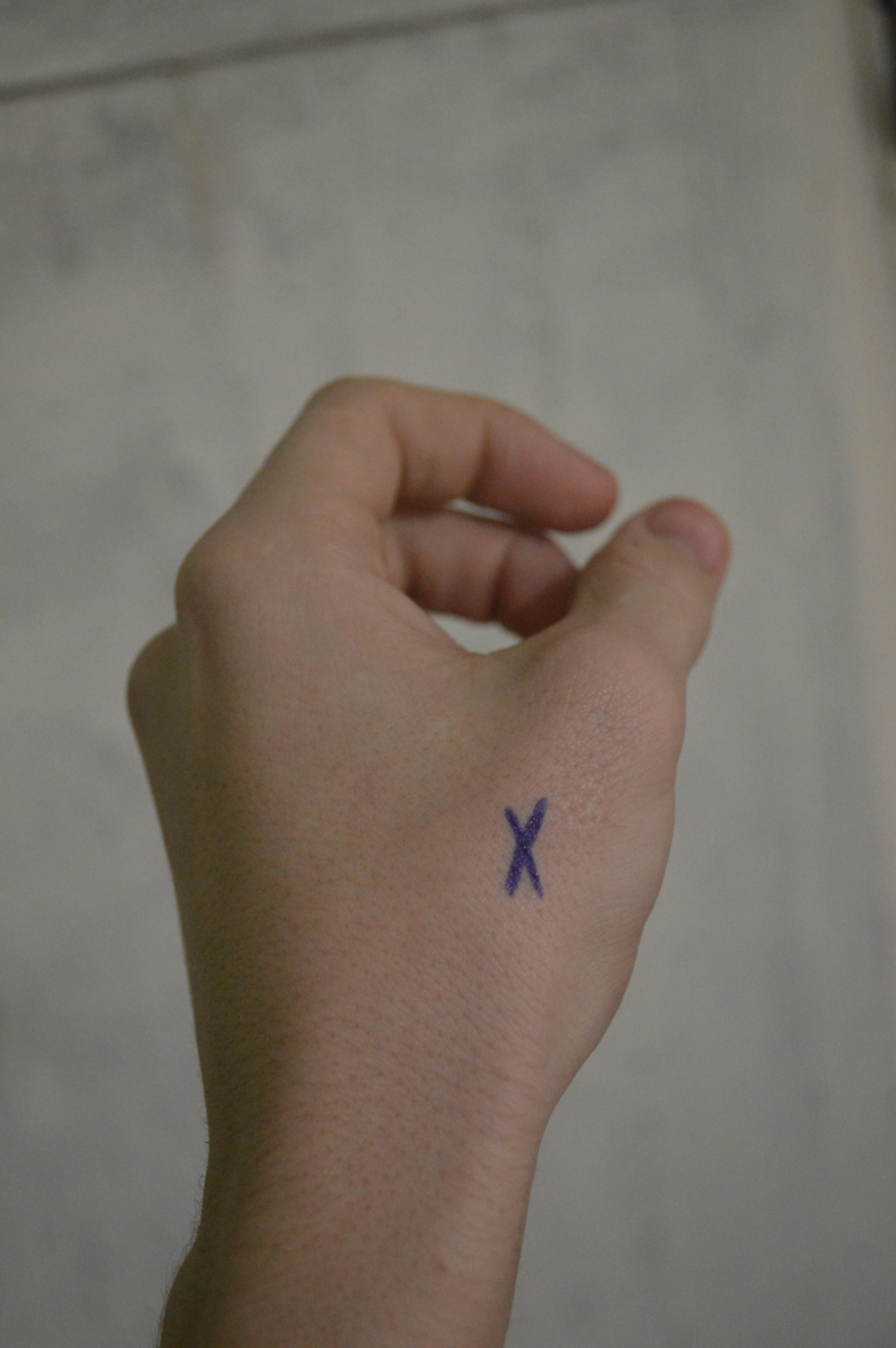 Ліва рука з мнемограмою